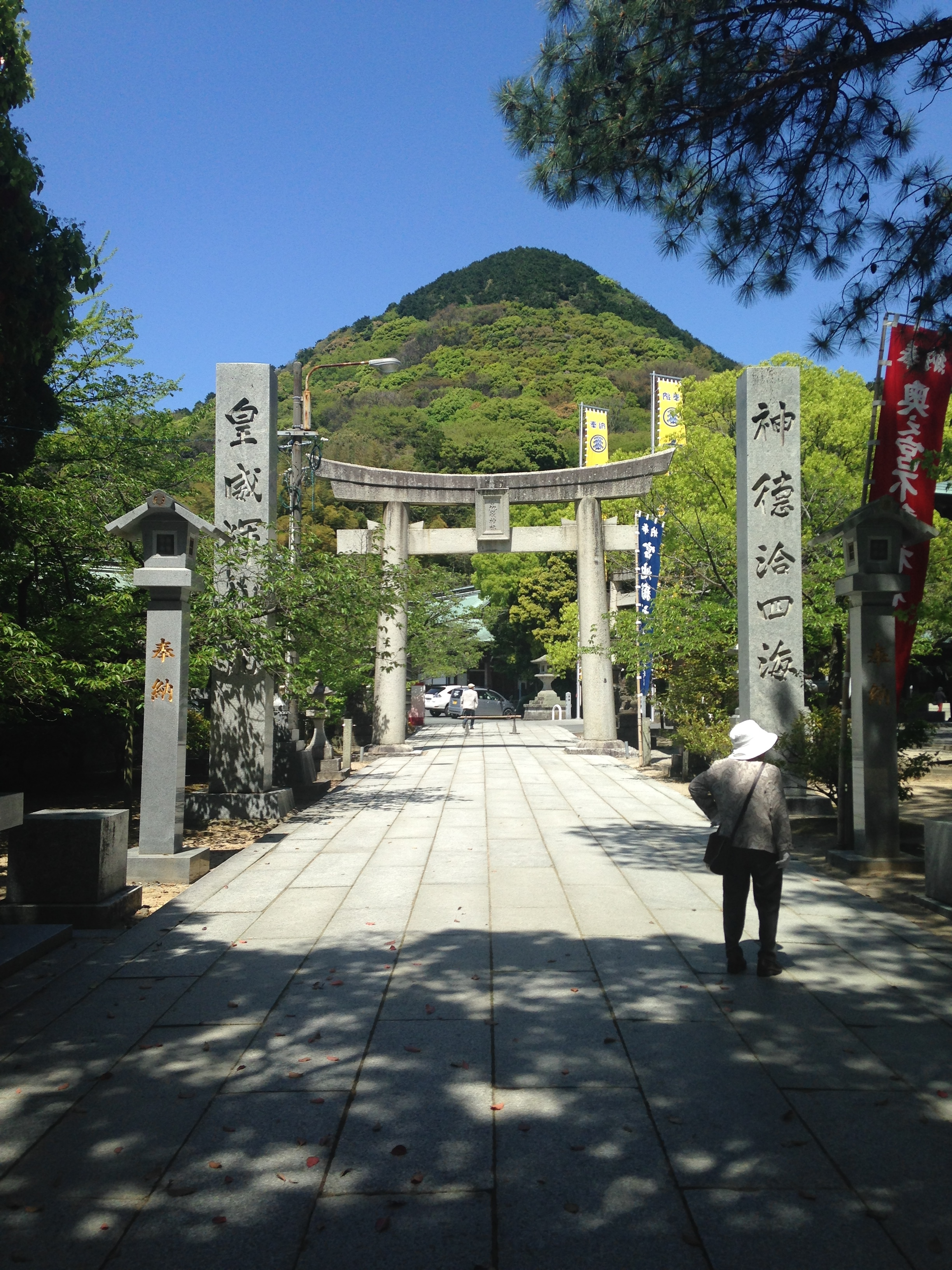 宮地嶽と宮地嶽神社の鳥居